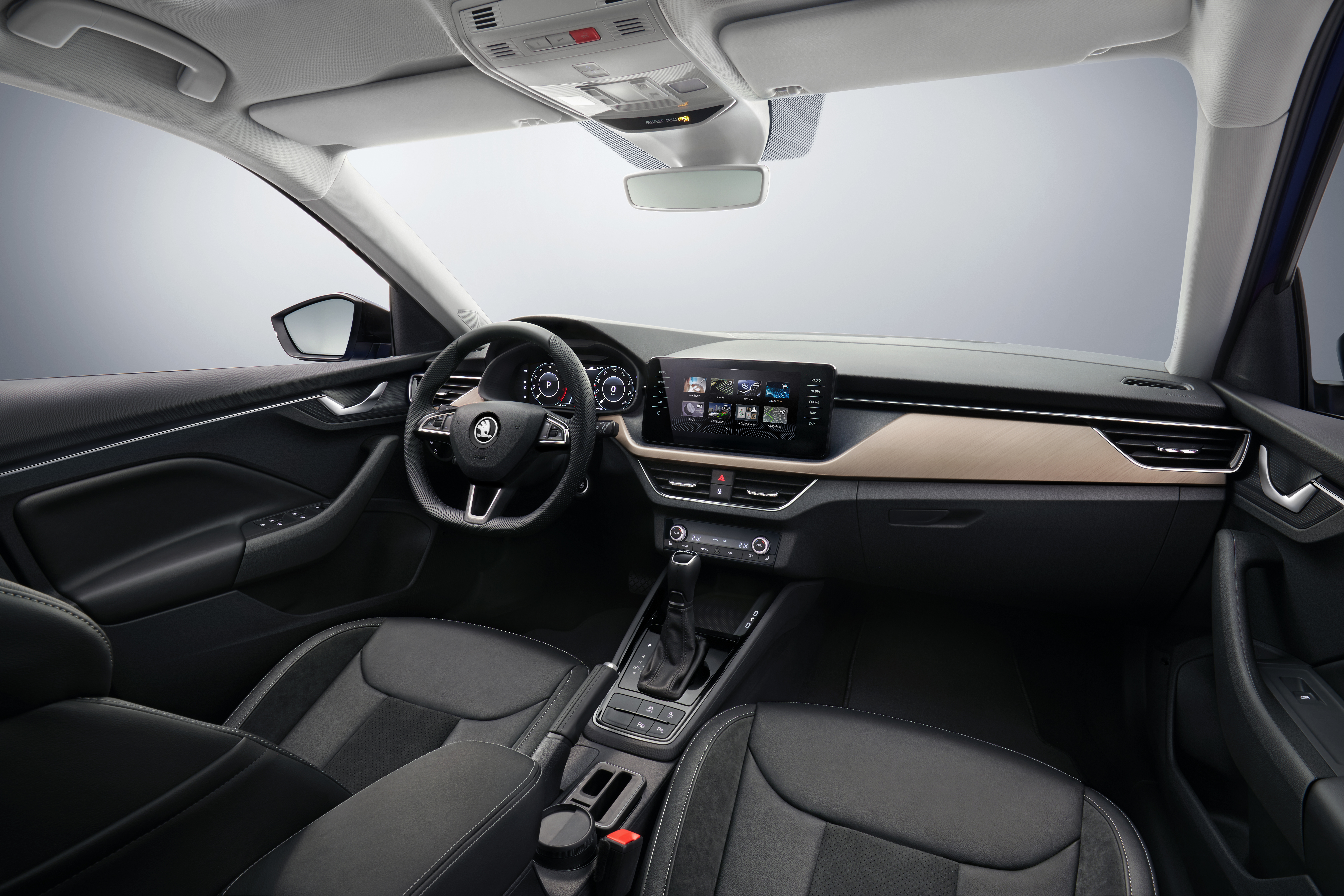 ŠKODA Scala